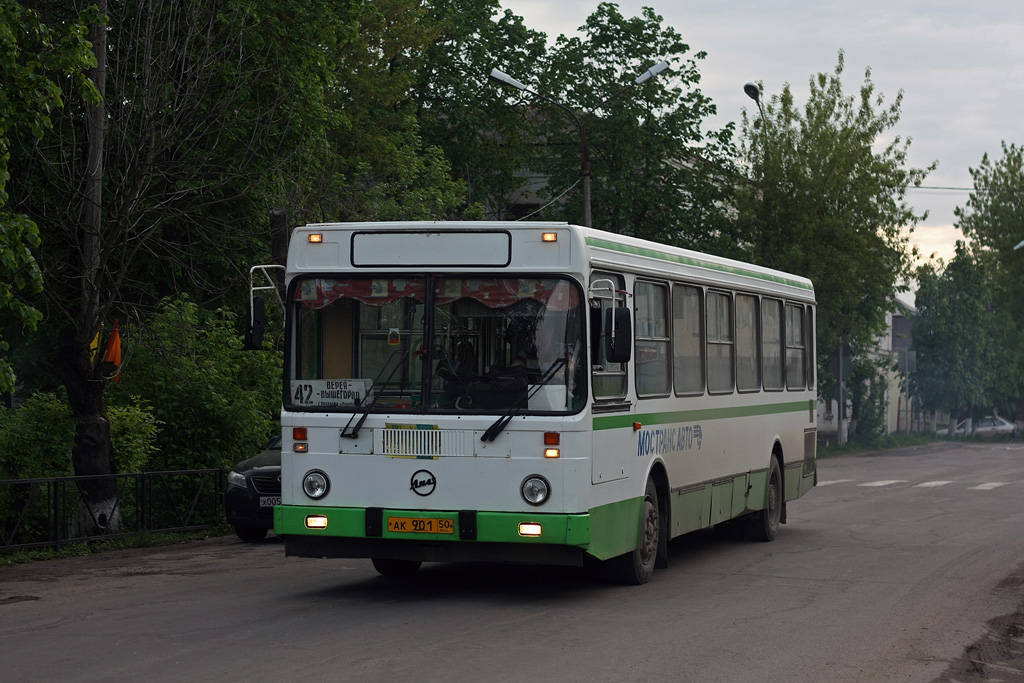 Автобус ЛиАЗ-5256 в г. Верея, Московская область